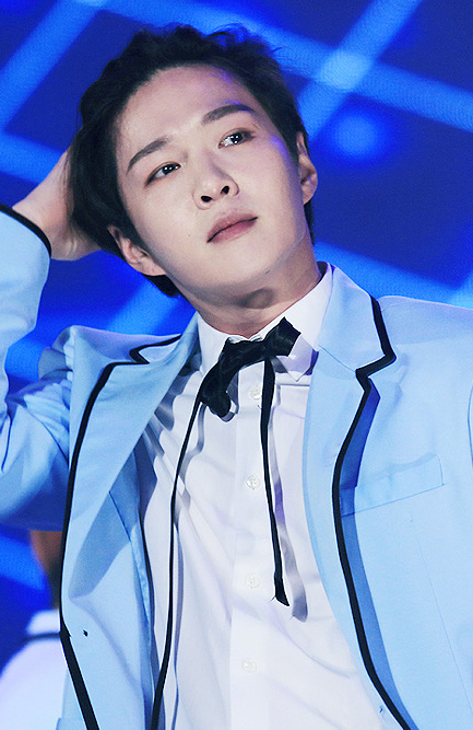 170617 파크콘서트대구